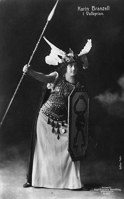 Karin Branzell i Valkyrian